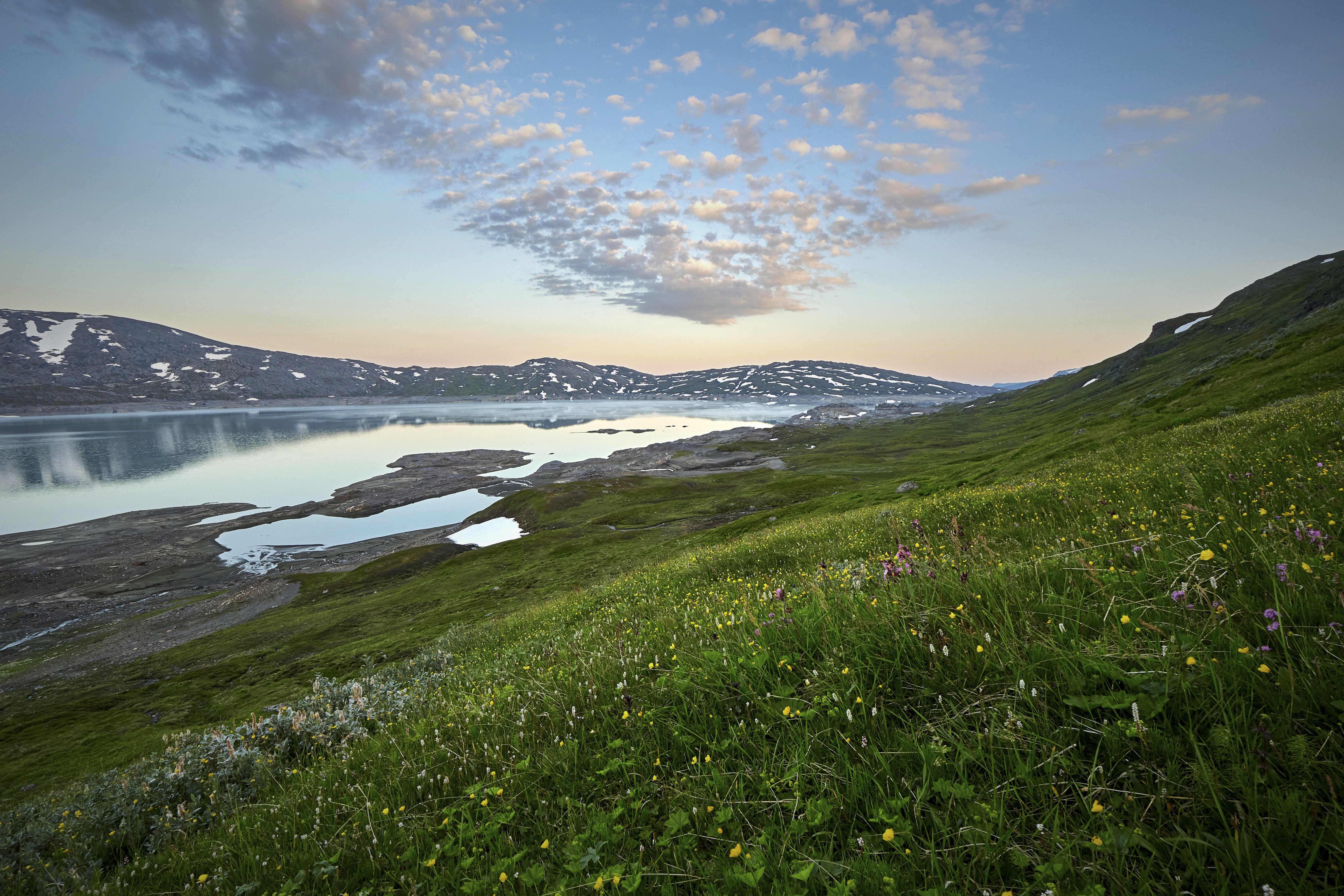 Foto: Rune Mattsson